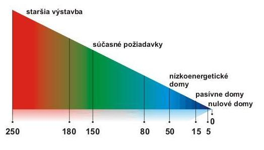 graf